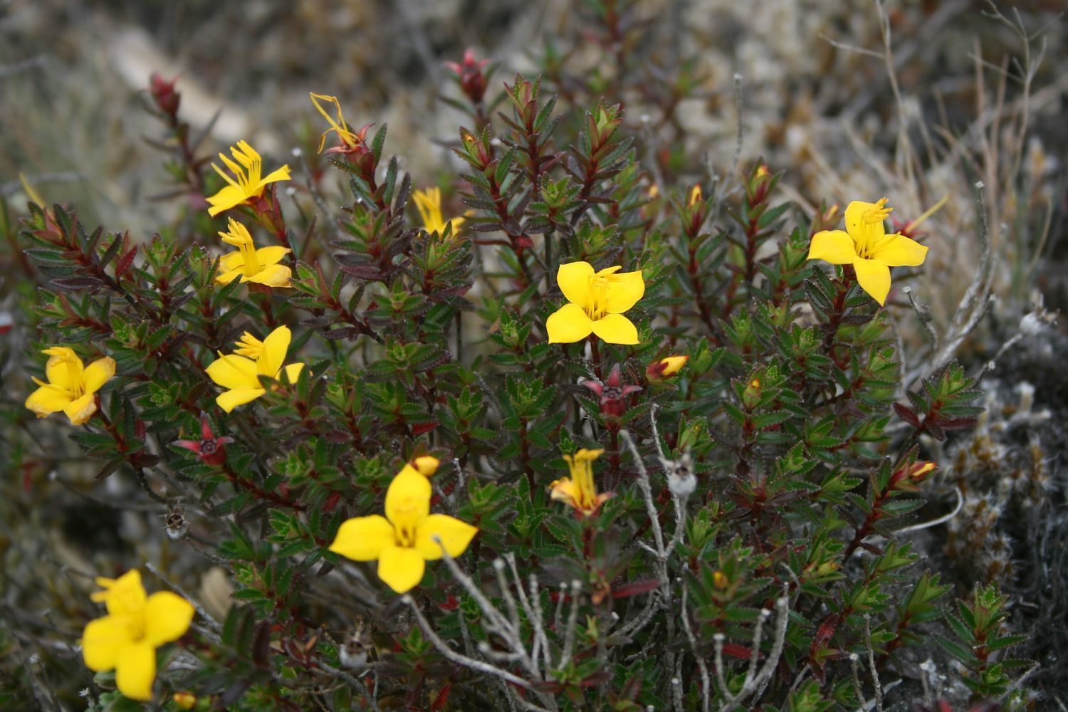 Chaetolepis cufodontisii, Schwarzmundgewächse (Melastomataceae) - Costa Rica: Prov. Cartago, Cordillera de Talamanca, Fahrweg E Carretera Interamericana, N Cerro Sákira, ca. 3250 m